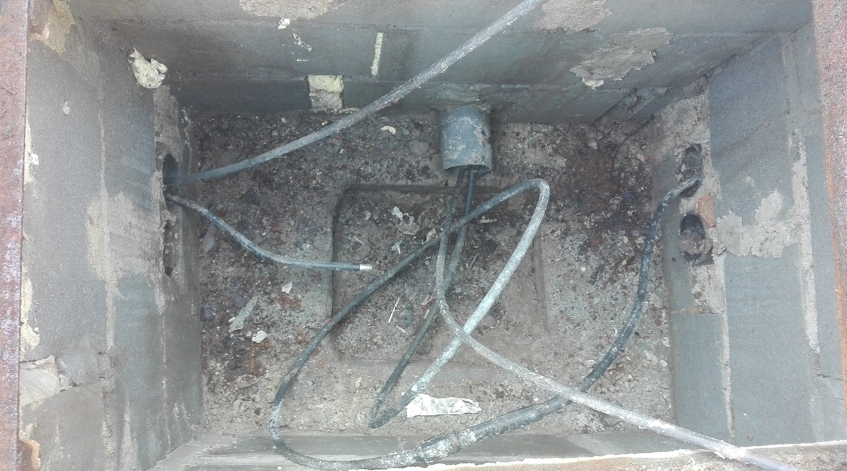 Wnętrze studni kablowej. Widoczne 2 rury 110 w przelocie, i jedno odejście 110 (np. do budynku).